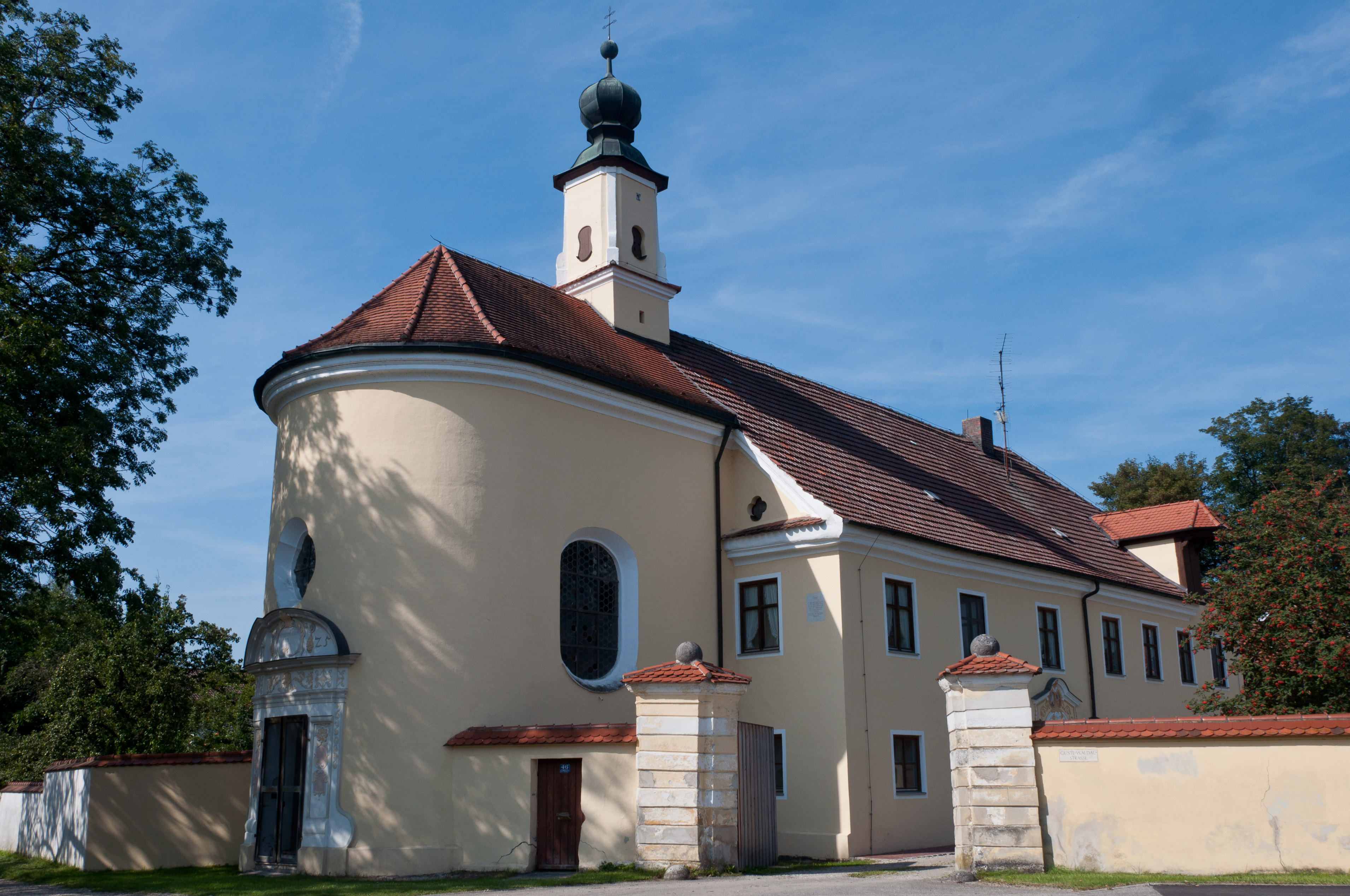 Piflas, Gustl-Waldau-Straße 46; Gebäudeaussenansicht, D-2-74-126-24, Denkmal Schloss, Hofummauerung, Stadel, Schlosskapelle St. Johann Nepomuk - barock